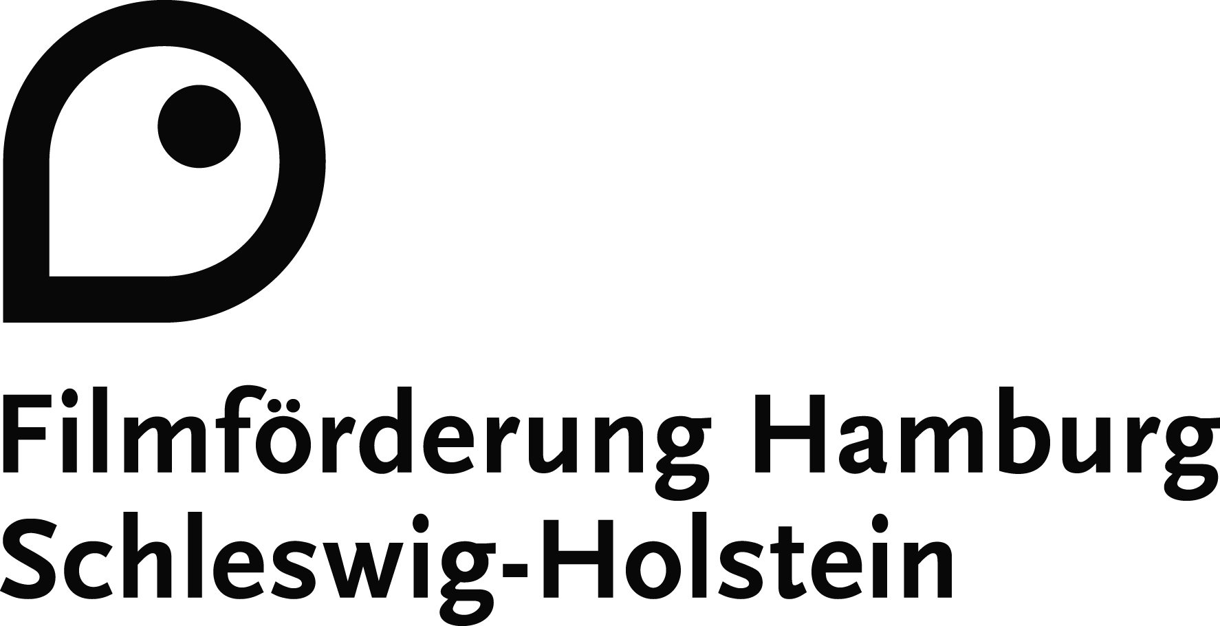 Logo der FFHSH 2019